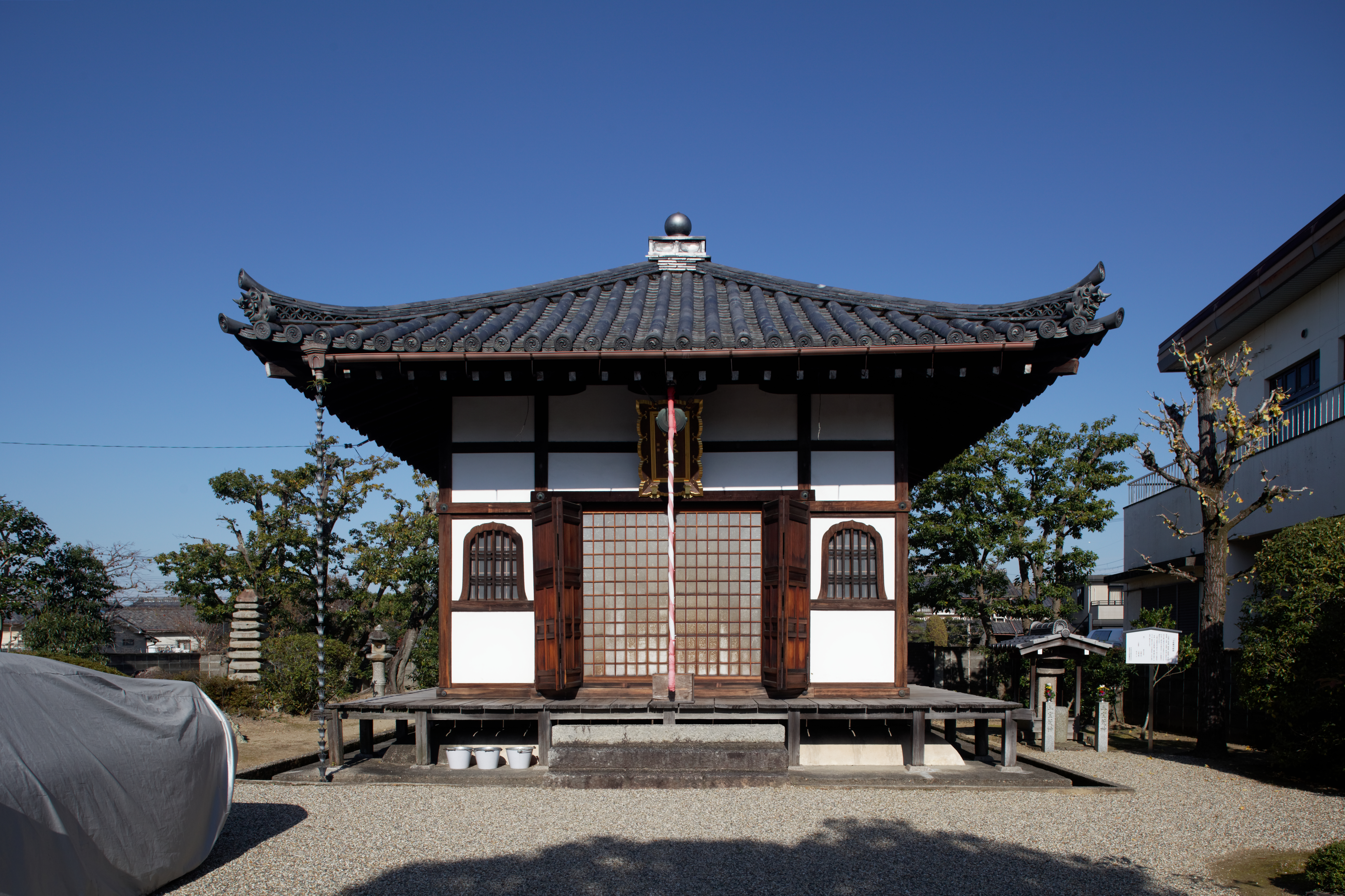 宝泉寺本堂。